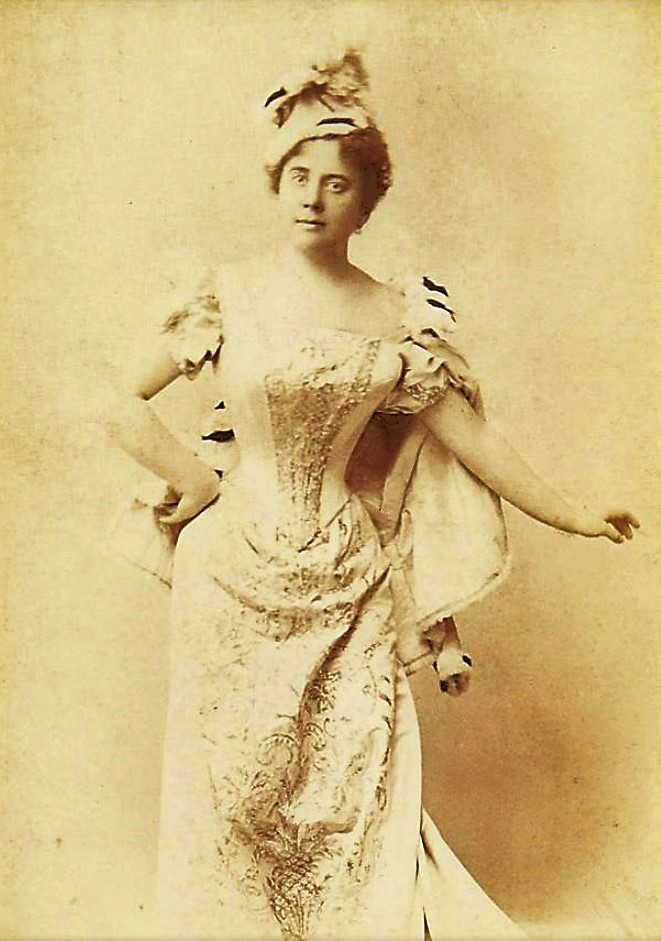 Оттилия Коллин - австрийская актриса и певица (сопрано)